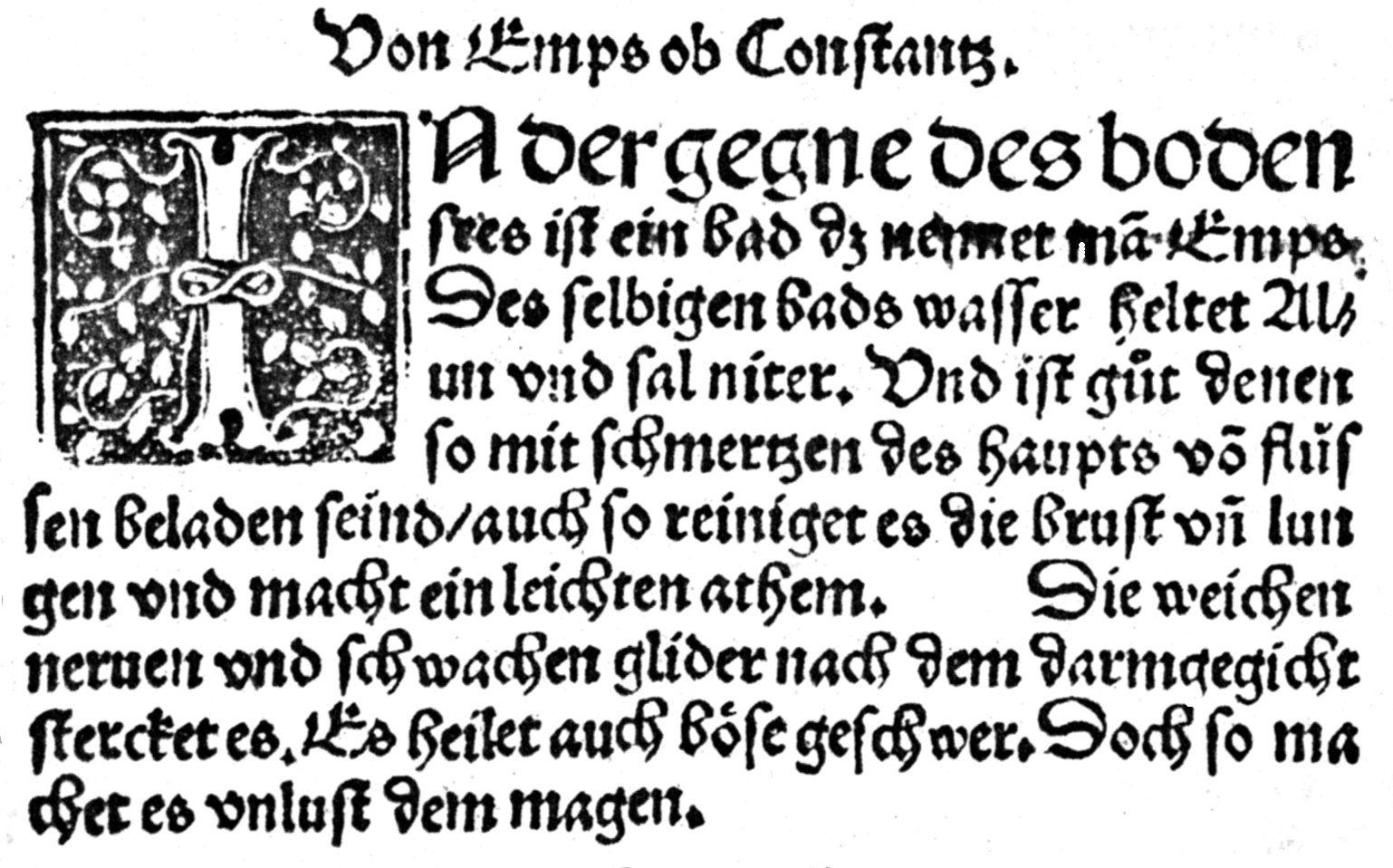 Beschreibung des Schwefel-Bads